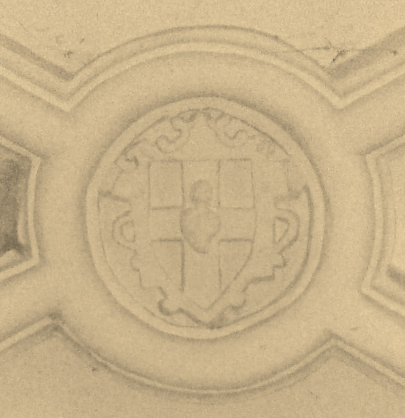 Clef de voûtes de l'église de Thorrenc décorée par les armoiries de Mgr Bonnet